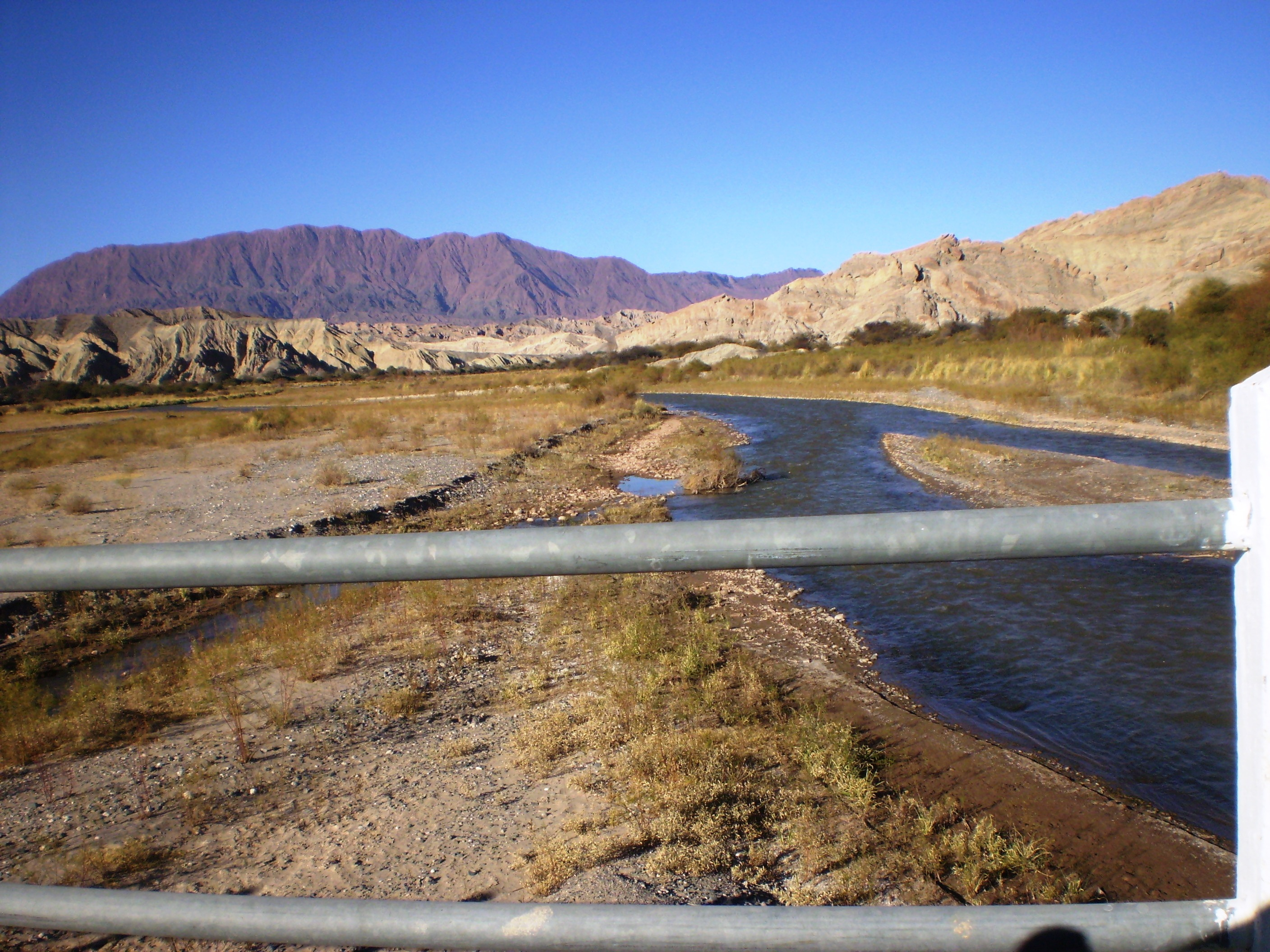 Puente de la ruta 40 sobre el Río Calchaquí, cerca de la localidad de San Carlos, Salta